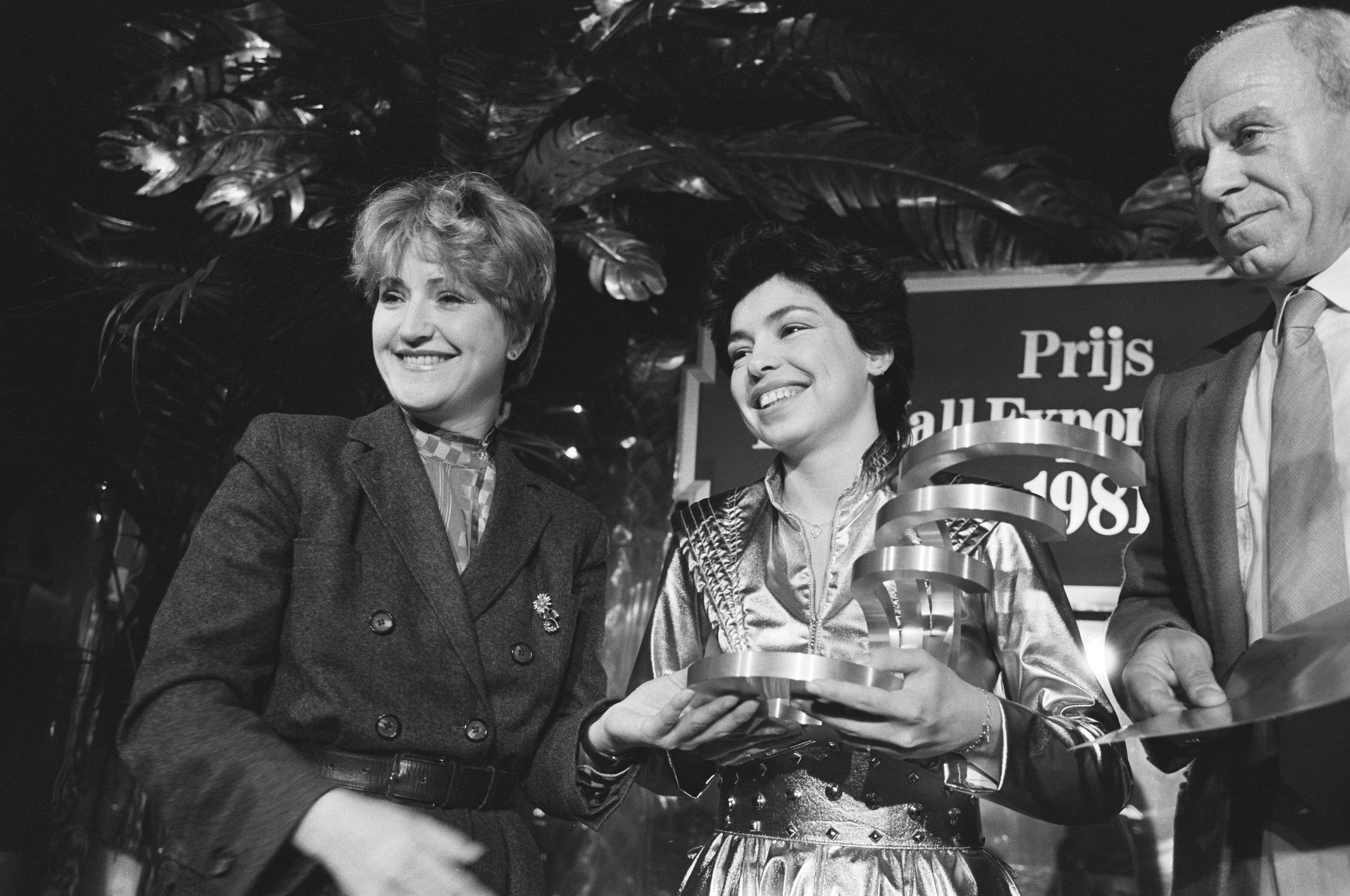 Collectie / Archief : Fotocollectie Anefo Reportage / Serie : [ onbekend ] Beschrijving : Jasperina de Jong (l.) overhandigt Marie Henselmans (de Pall Mall Export Prijs in Lido in Amsterdam. Rechts Wim Bary. Datum : 2 februari 1982 Locatie : Amsterdam, Noord-Holland Trefwoorden : overhandigingen, prijzen Persoonsnaam : Jong, Jasperina de Instellingsnaam : Lido Fotograaf : Bogaerts, Rob / Anefo Auteursrechthebbende : Nationaal Archief Materiaalsoort : Negatief (zwart/wit) Nummer archiefinventaris : bekijk toegang 2.24.01.05 Bestanddeelnummer : 931-9482